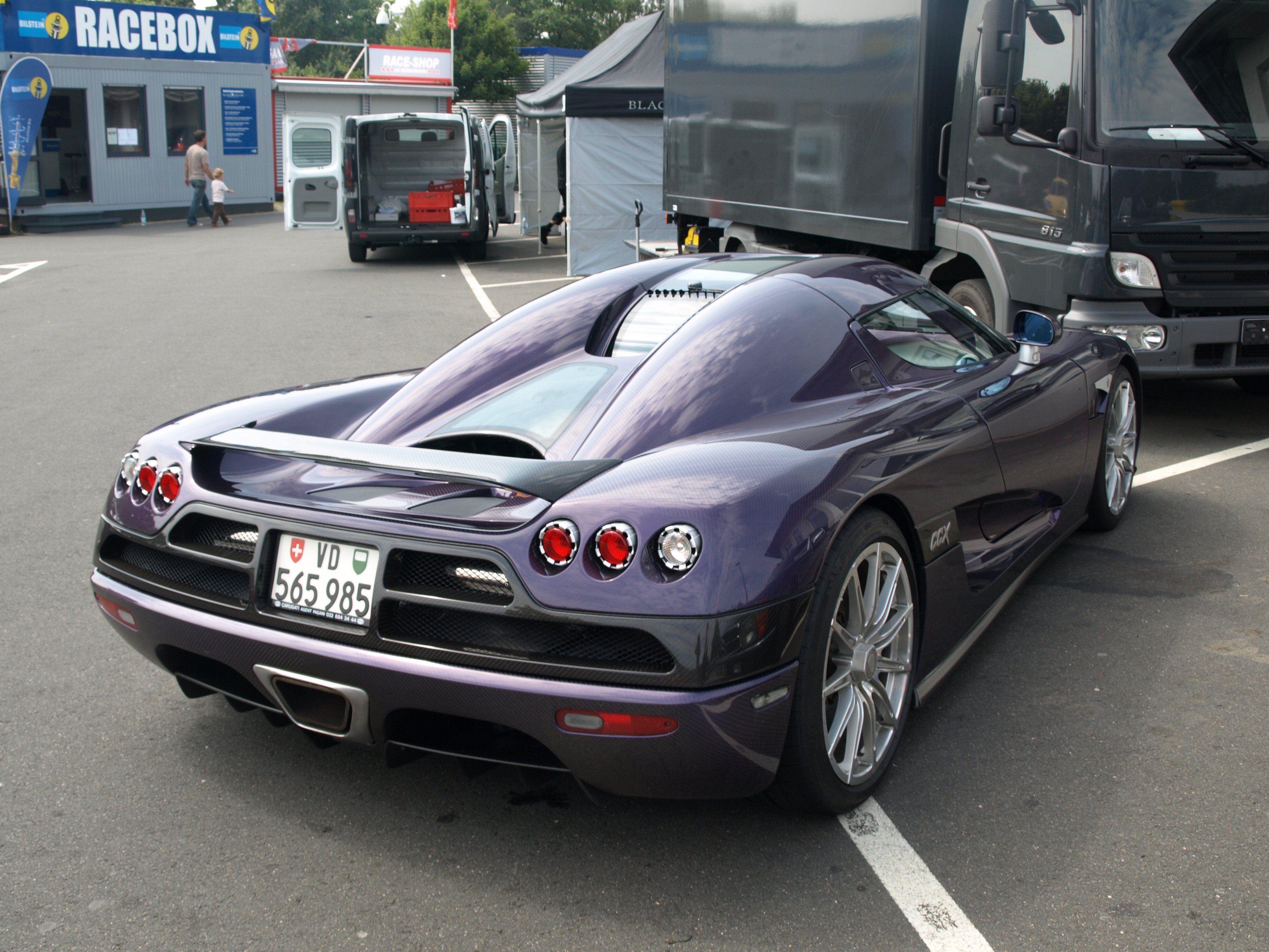 Koenigsegg CCX